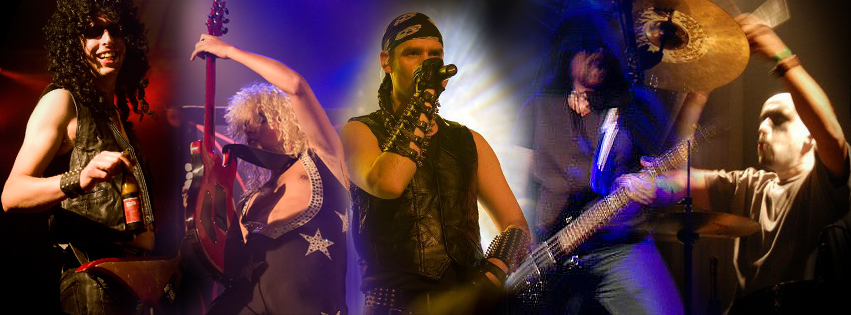 Bandleden van Patatje Metal. Vlnr: Het Beest, Rammstein Shaffy, Marco Borsatan, André H666, Nico Haat